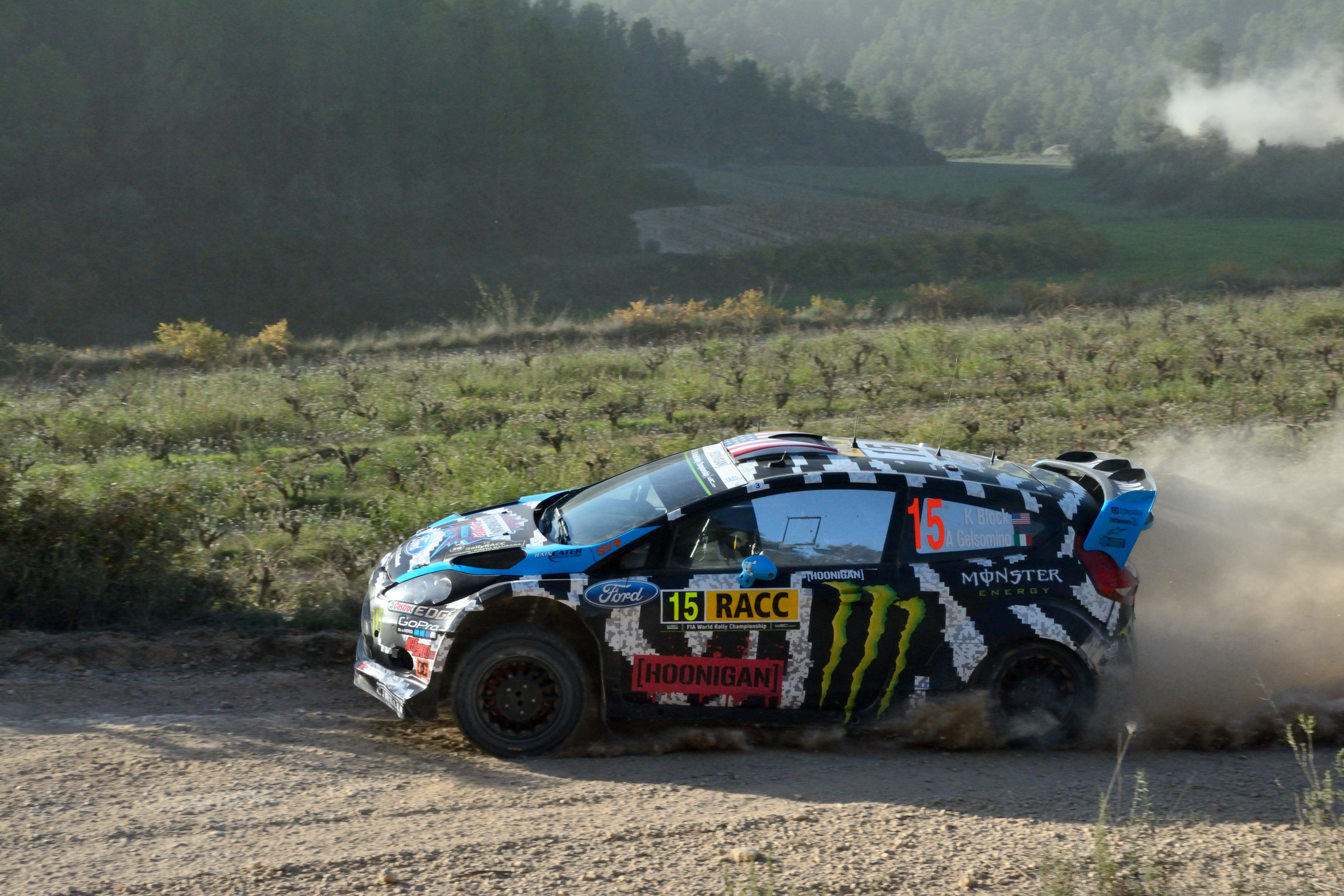 Caseres, 43787, Tarragona, Spain